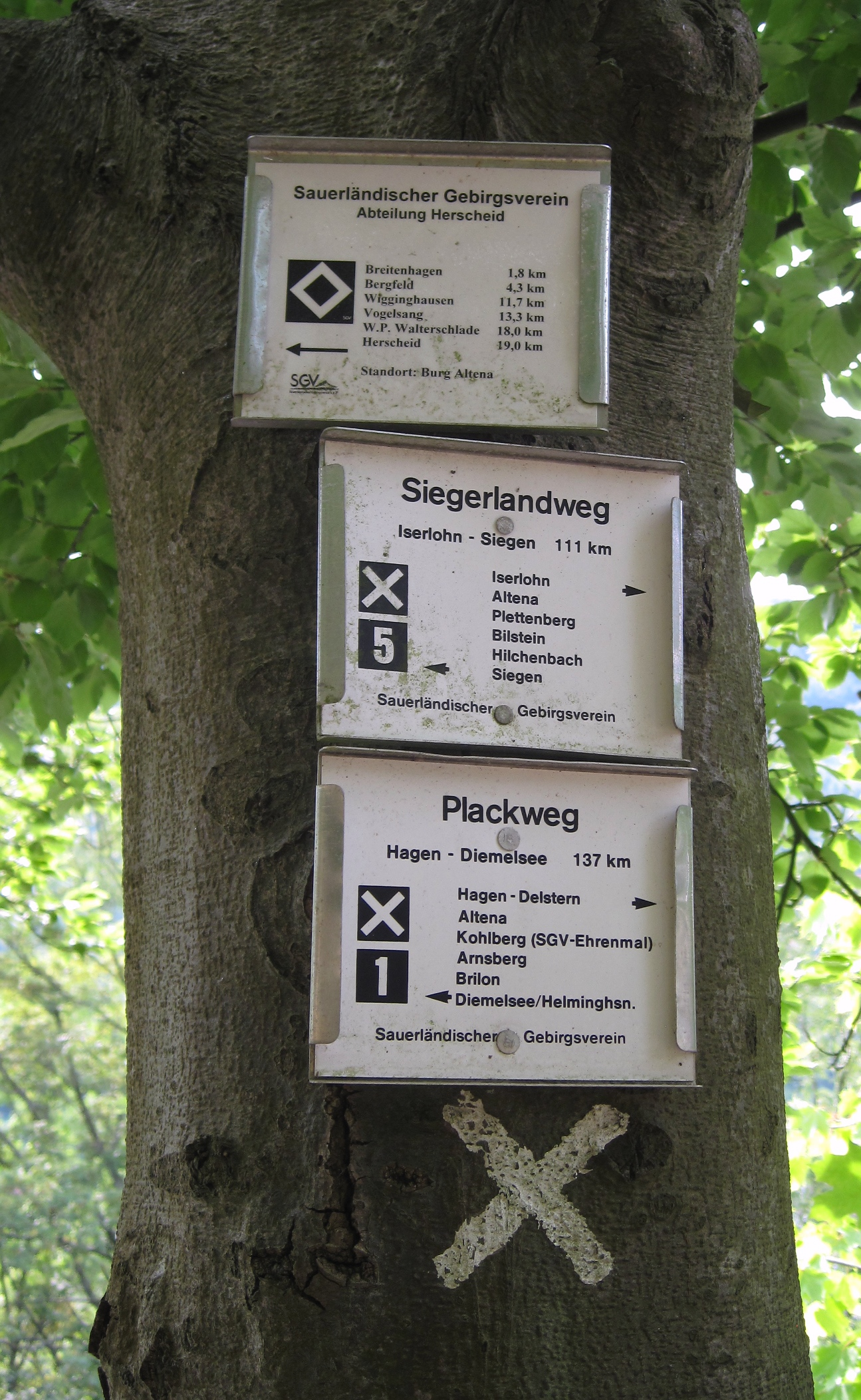 SGV-Wegzeichen für den Siegerlandweg (X5) und den Plackweg (X1) in Altena nahe der Burg Altena am Klusenberg in Altena. Die Hauptwanderstrecken des SGV haben als Wegzeichen das weiße Andreaskreuz "X", das an Kreuzungspunkten um die Ziffer des jeweiligen Weges erweitert ist.